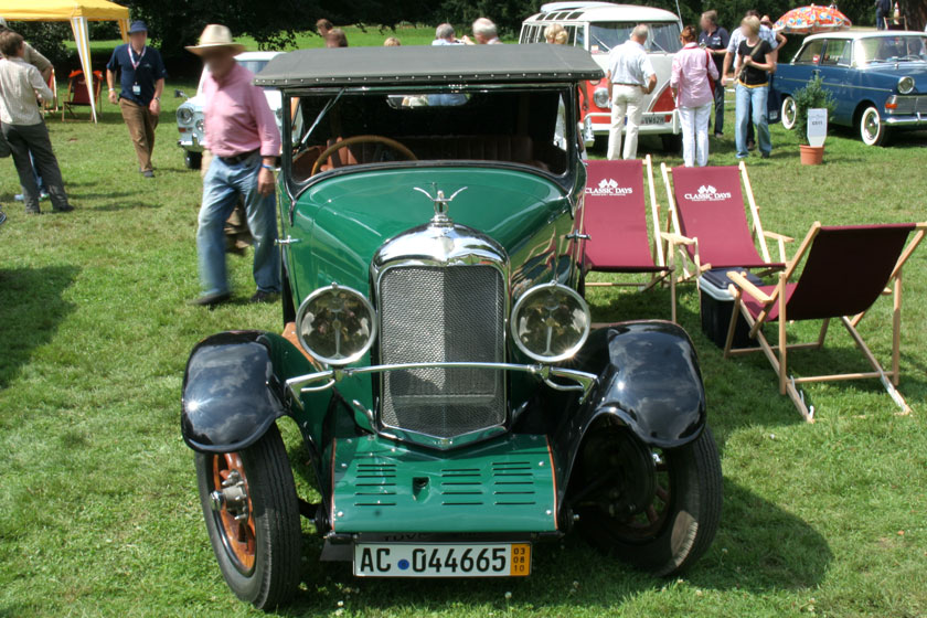 1929 Imperia 5-25 HP Cabrio_IMG_7549